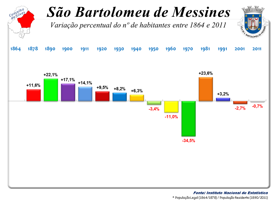 Censos 1864/2011